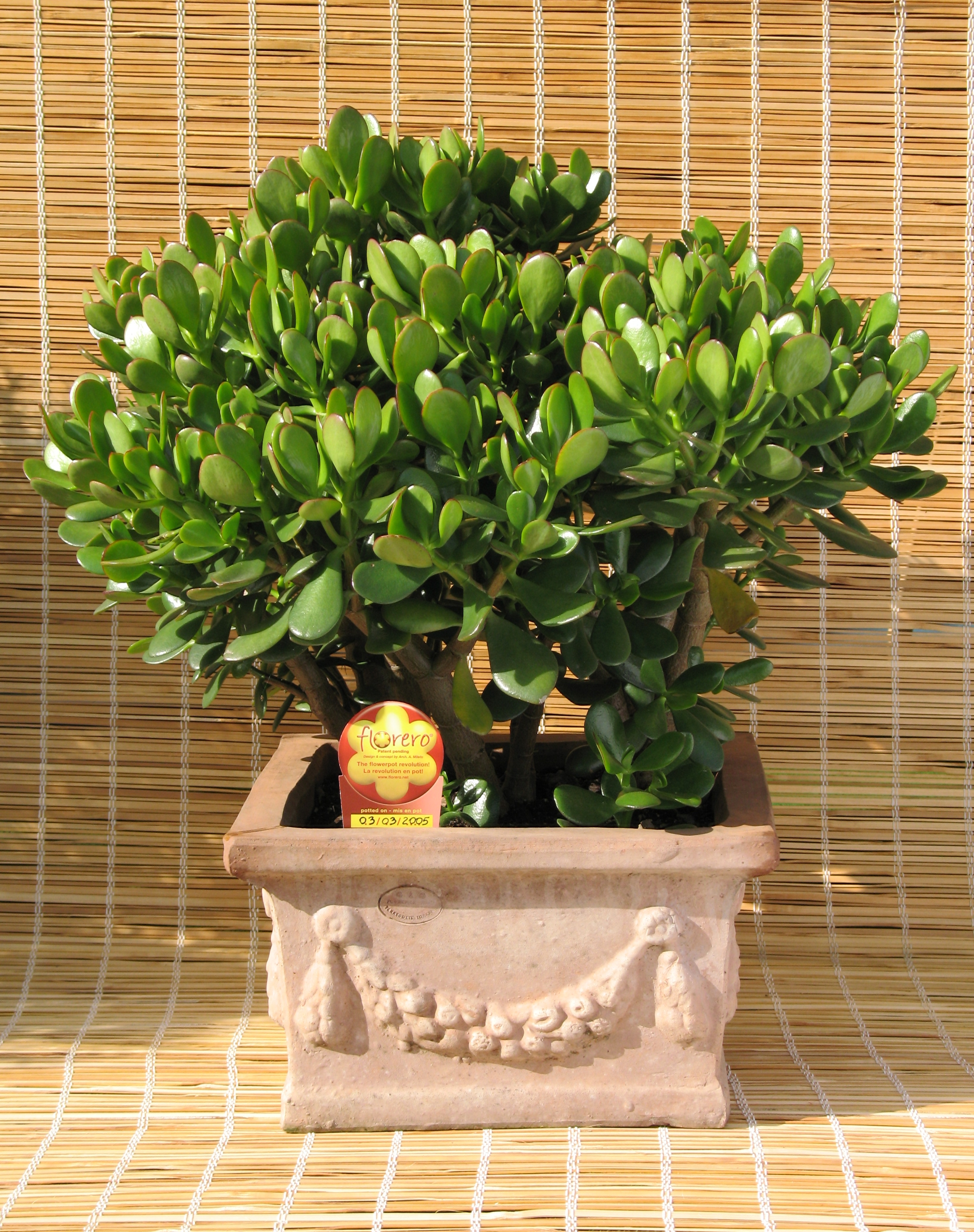 "Crassula ovata" (Jade plant) in terracotta clay garden pot.